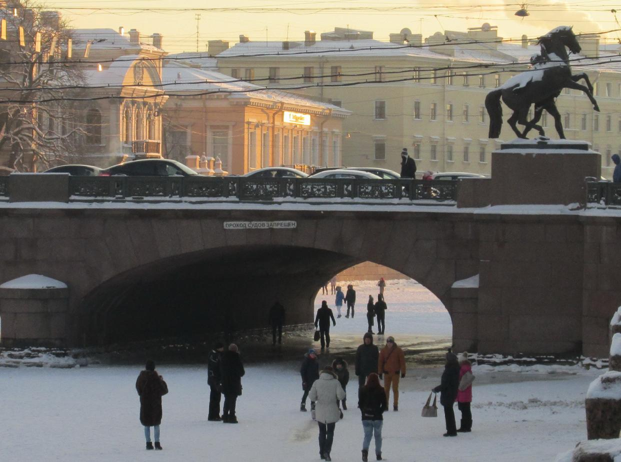 Когда, река Фонтанка в центре Санкт-Петербурга надежно покрывается льдом, она превращается в популярную пешеходную зону.